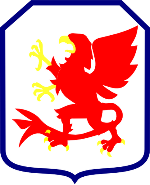 Godło - znak 7 Dywizji Piechoty Polskich Sił Zbrojnych na Zachodzie